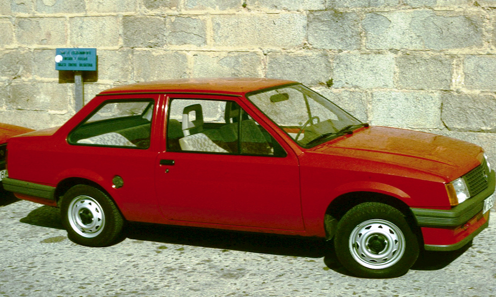 Opel Corsa Berline Madrid